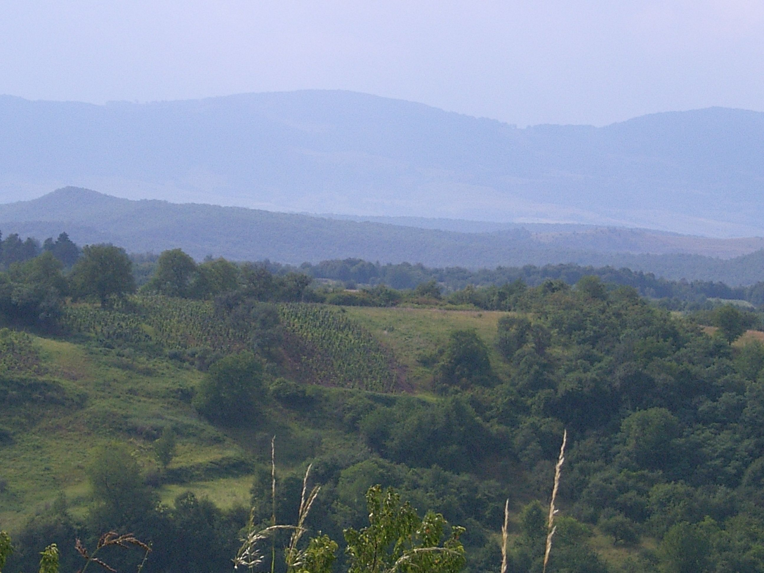 Alszeg, Kalotaszeg egyik, az Almás-patak völgyében húzódó része (Erdély). Települései alacsony fekvésűek (310–480 m)